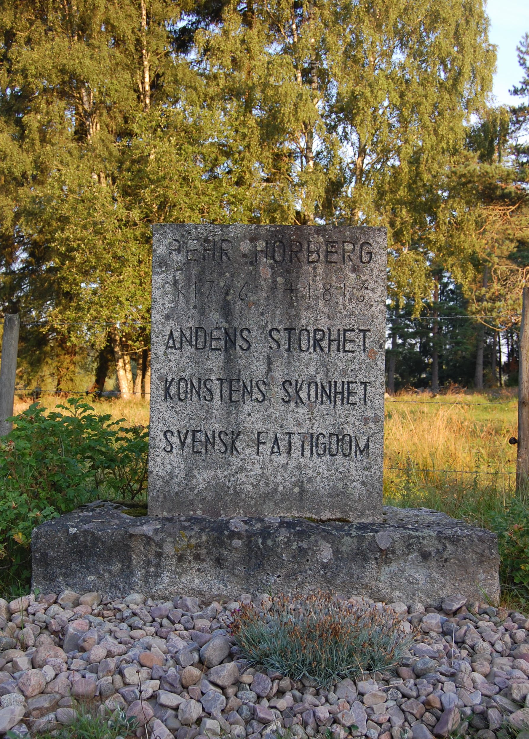 Hörbergsstenen, Komstad, Sävsjö kommun